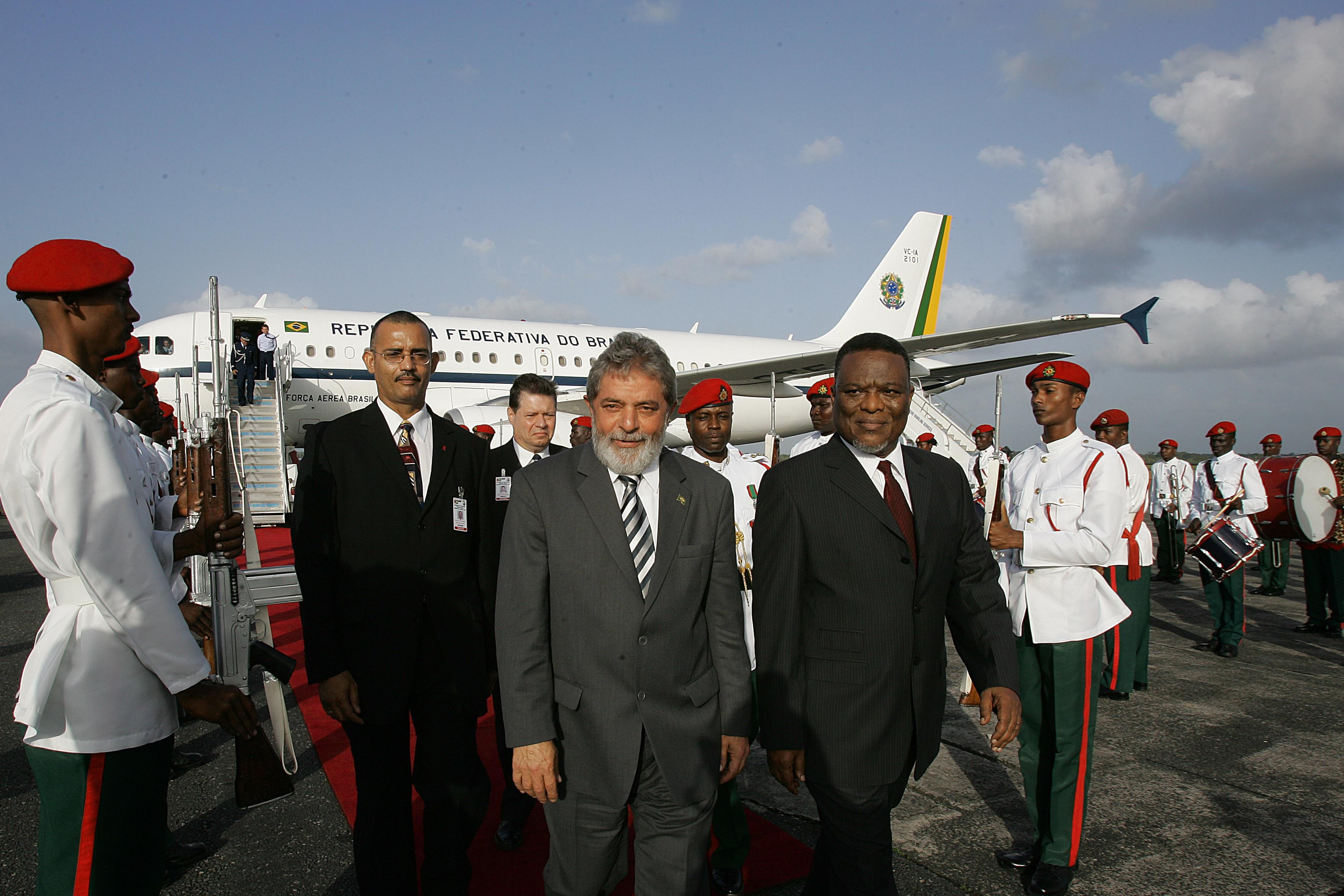 The President of Brazil, Mr. Luiz Inacio Lula da Silva on his official trip to Guyana.O Presidente do Brasil, Sr. Luiz Inácio Lula da Silva em visita oficial à Guiana.